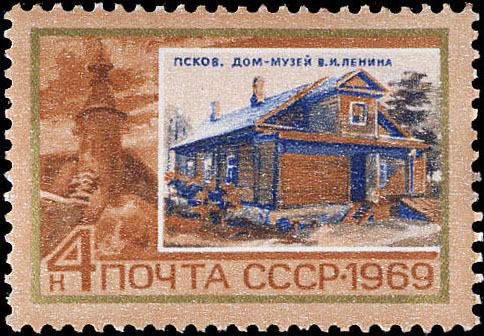 На почтовой марке изображён дом Искры во Пскове, где в апреле 1900 года состоялось совещание по созданию общероссийской рабочей газеты Искра.